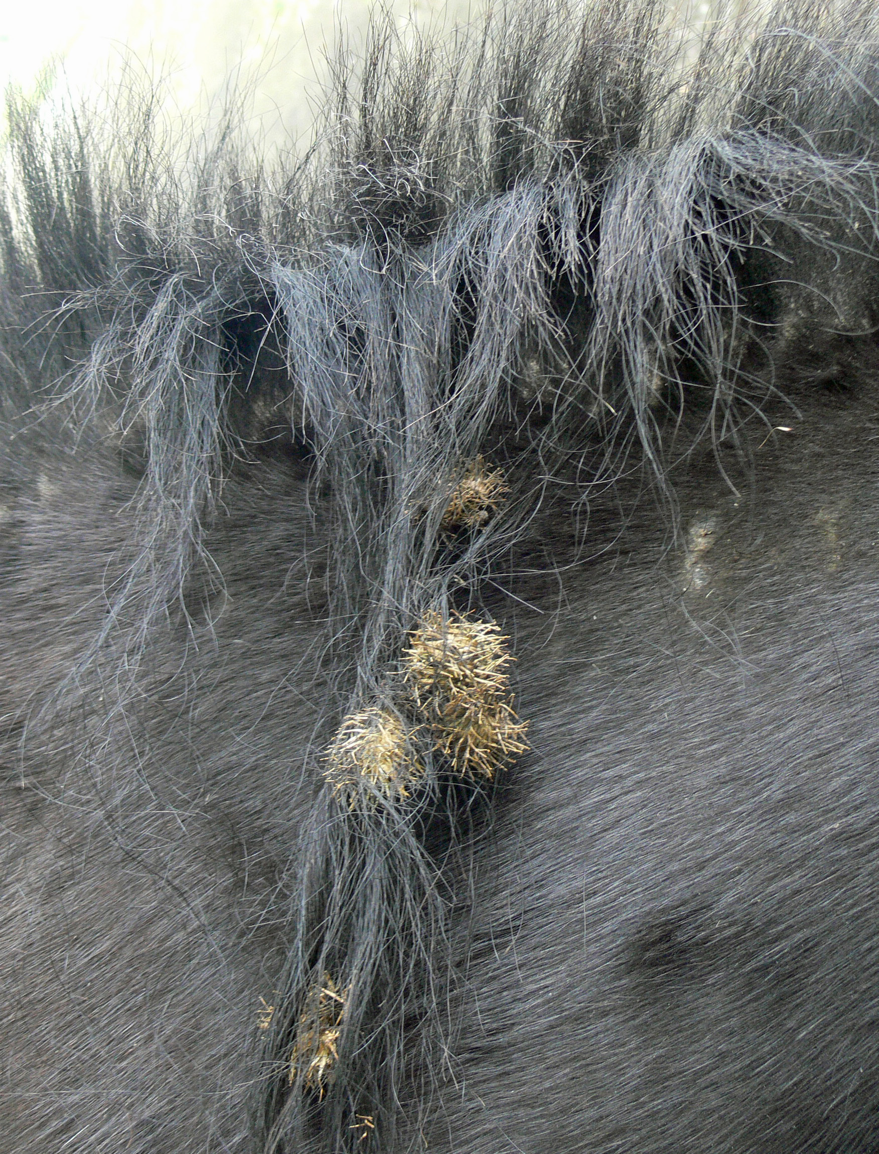 Les bardanes (plantes bisannuelles) font des fleurs en capitules dont les bractées se terminent par des sortes de crochets (évoquant le velcro), permettant à ces capitules de s'accrocher au poil des animaux (et aux vêtements), ce qui favorise la dispersion des graines (zoochorie).